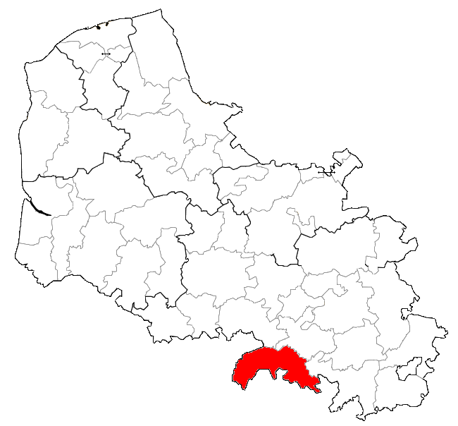 Localisation de l'ancienne CCCPA dans le 62.